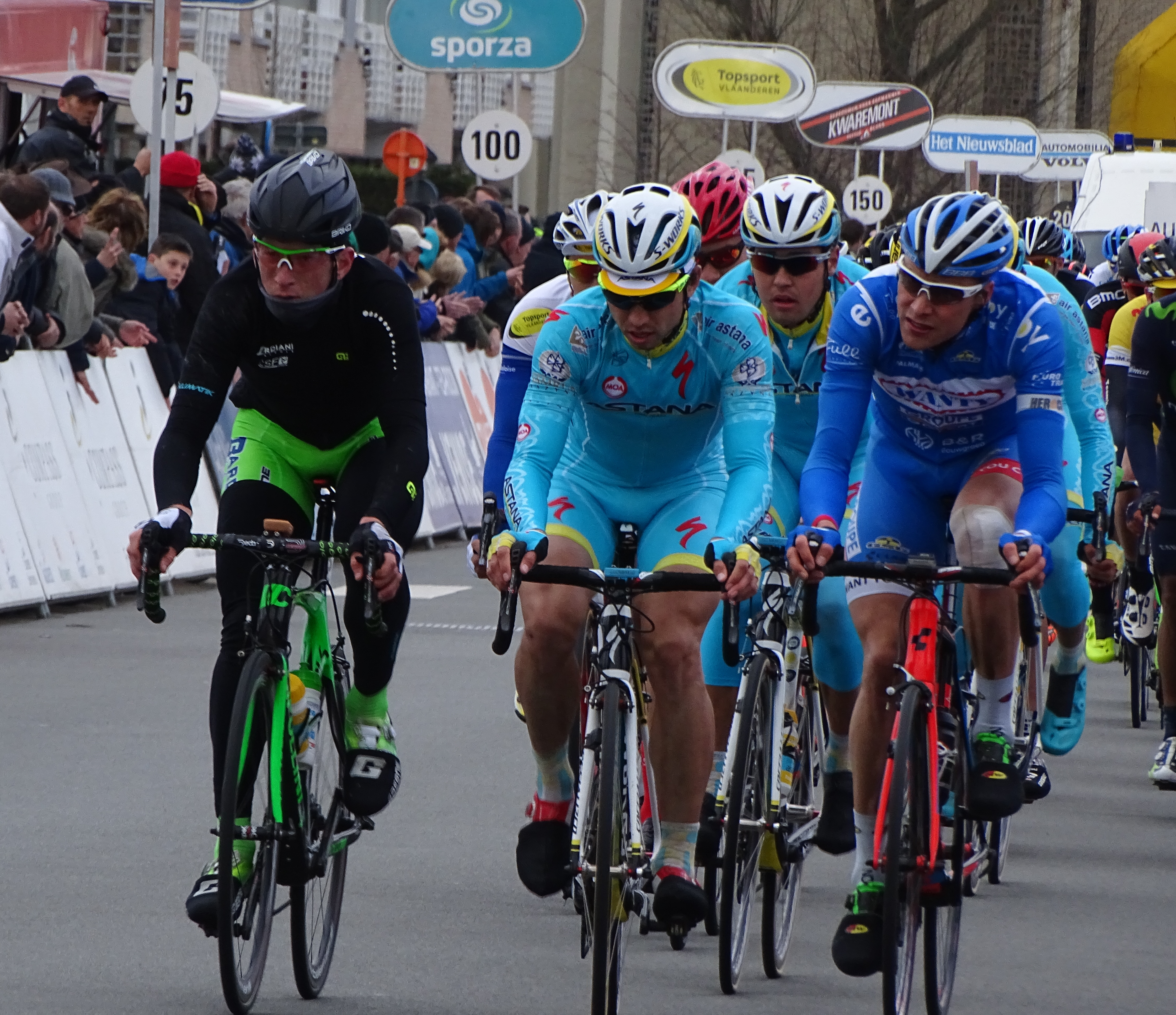 Reportage réalisé le mercredi 1er avril à l'occasion de l'arrivée de la deuxième étape des Trois jours de La Panne 2015 à Coxyde, Belgique.